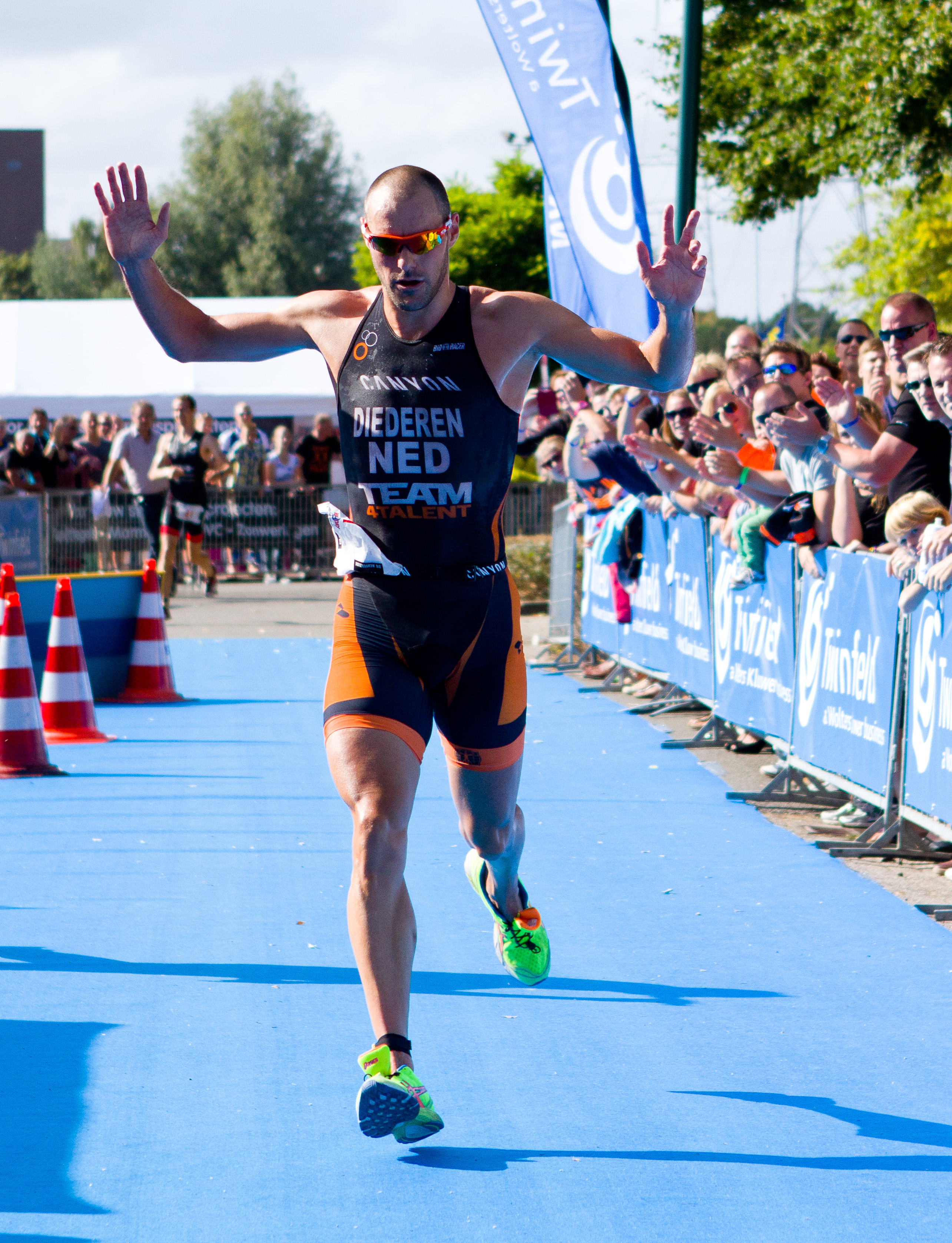 Bas Diederen winning 31e Twinfield Triathlon Veenendaal